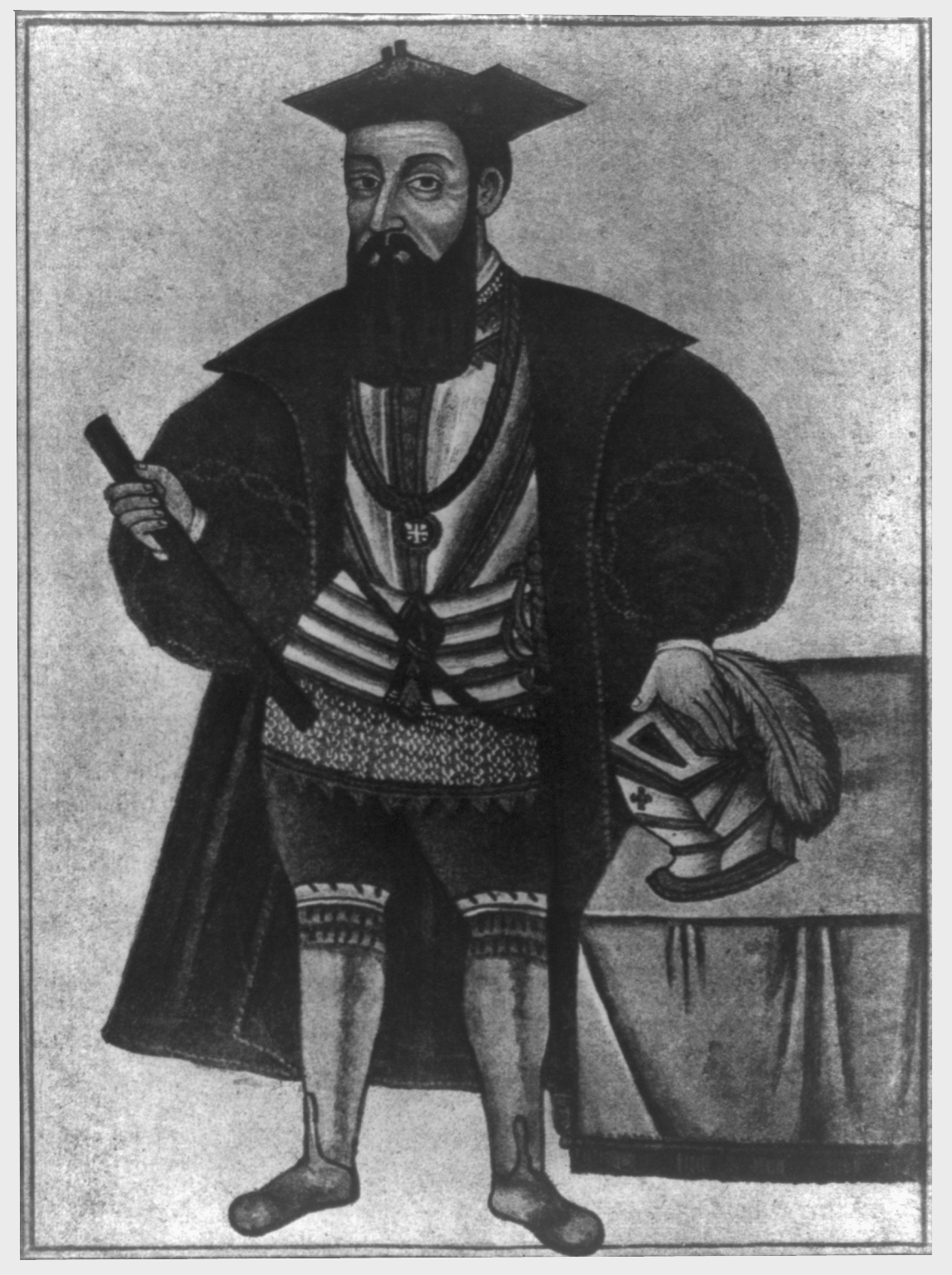 Vasco da Gama, navegador e explorador português.